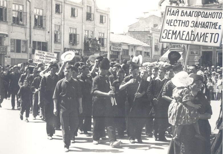 4-ти селскостопански културен и национален събор, 28 - 29 август 1938 г., гр. Варна. Парад на участниците в събора по ул. Княз Борис І.